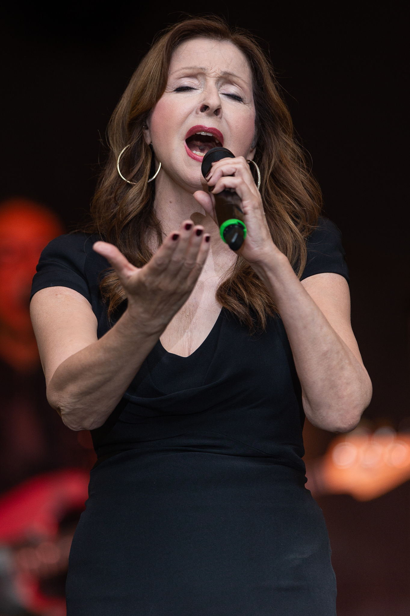 Concertbüro Franken,Konzert,Livekonzert,Livemusik,Musik,Serenadenhof,Vicky Leandros